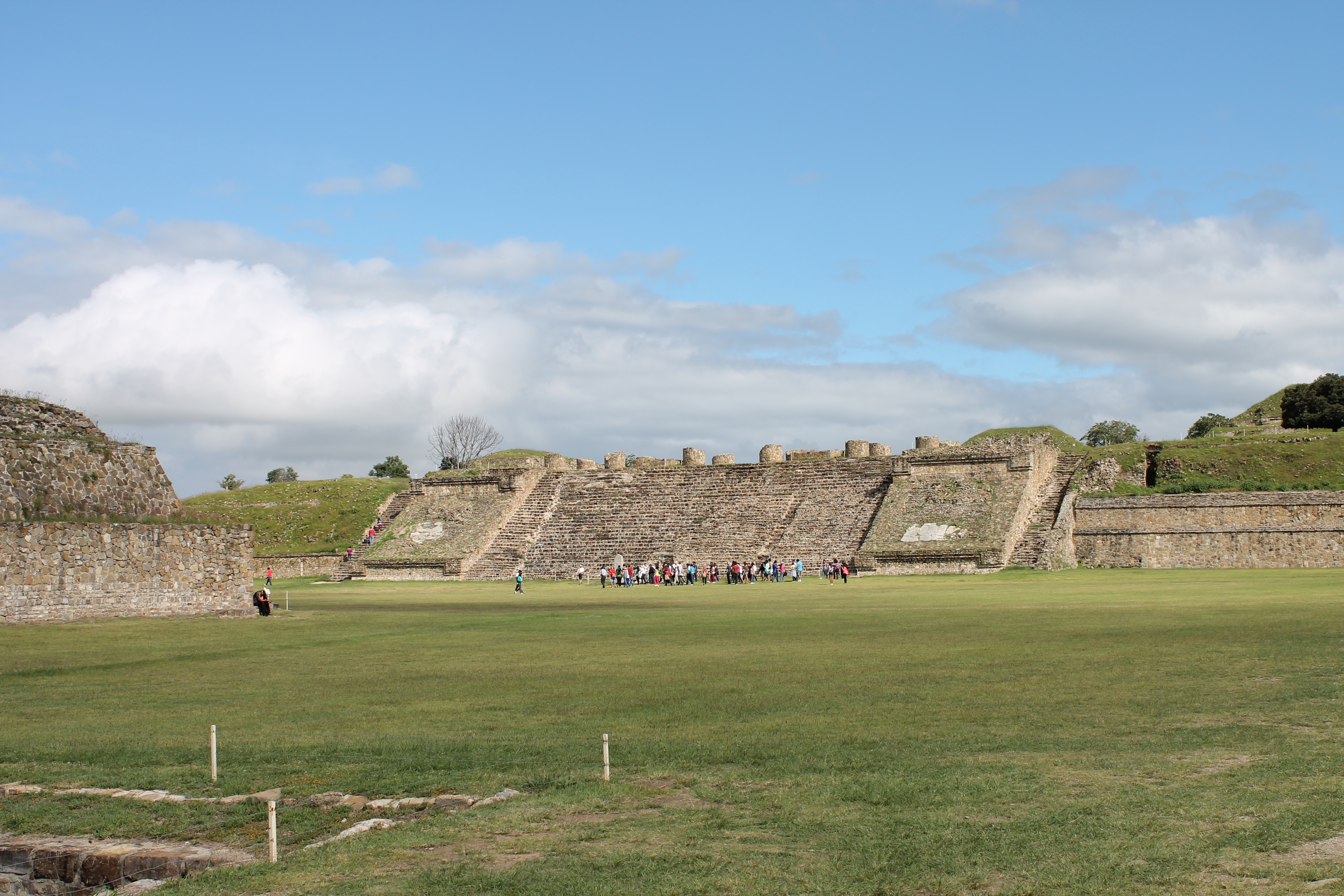 Se aprecia la escalinata de piedra que conduce al Patio Hundido de la zona arqueológica de Monte Albán. Frente a la escalinata está ubicada la Estela 9.